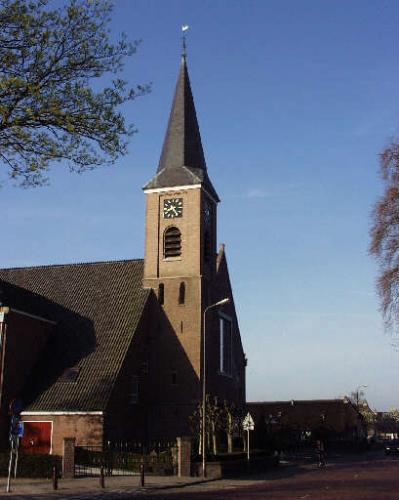 Eigen foto